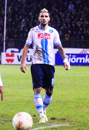 Behrami during AIK-Napoli, UEFA Europa League 2012-2013.